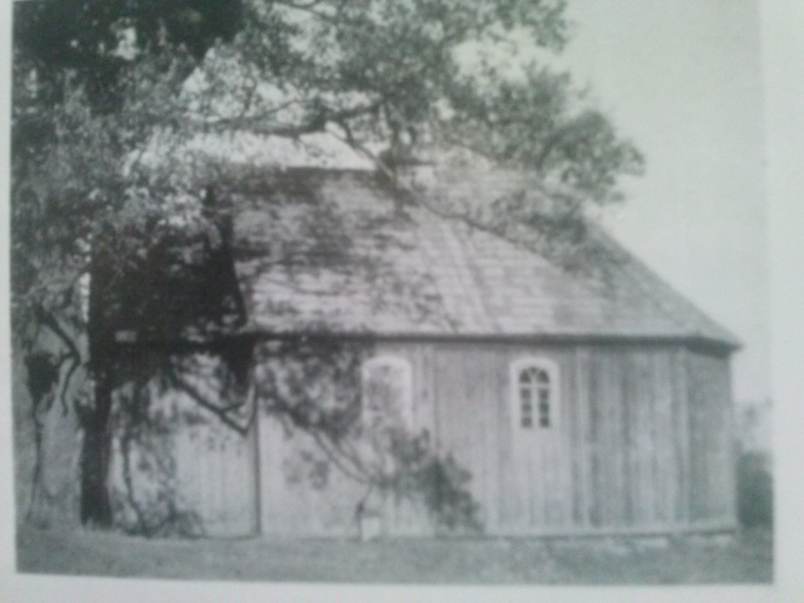 Niezachowana cerkiew filialna pw. Narodzenia Bogurodzicy w Grzęsce (1797-1945)